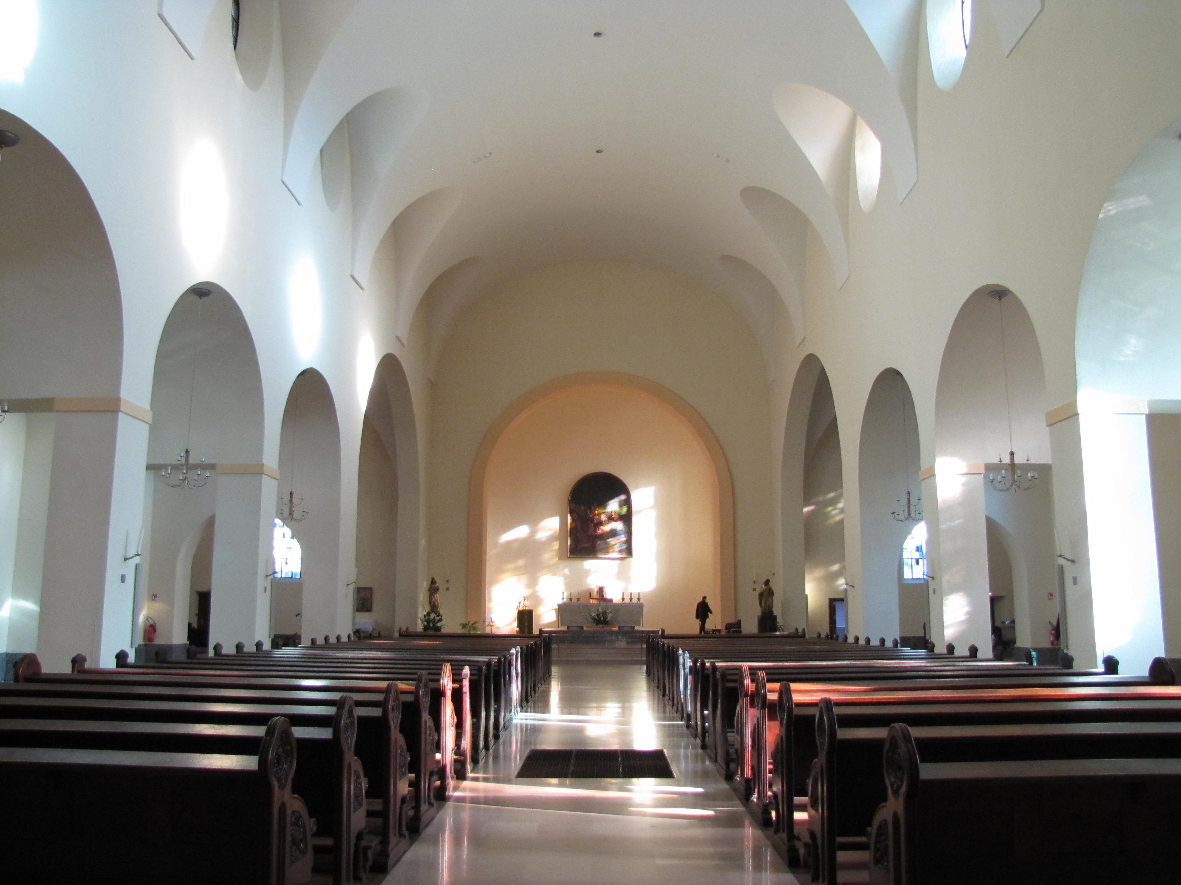 Alsace, Bas-Rhin, Église Sainte-Madeleine de Strasbourg (PA00085028). Vue intérieure de la nef vers le chœur.